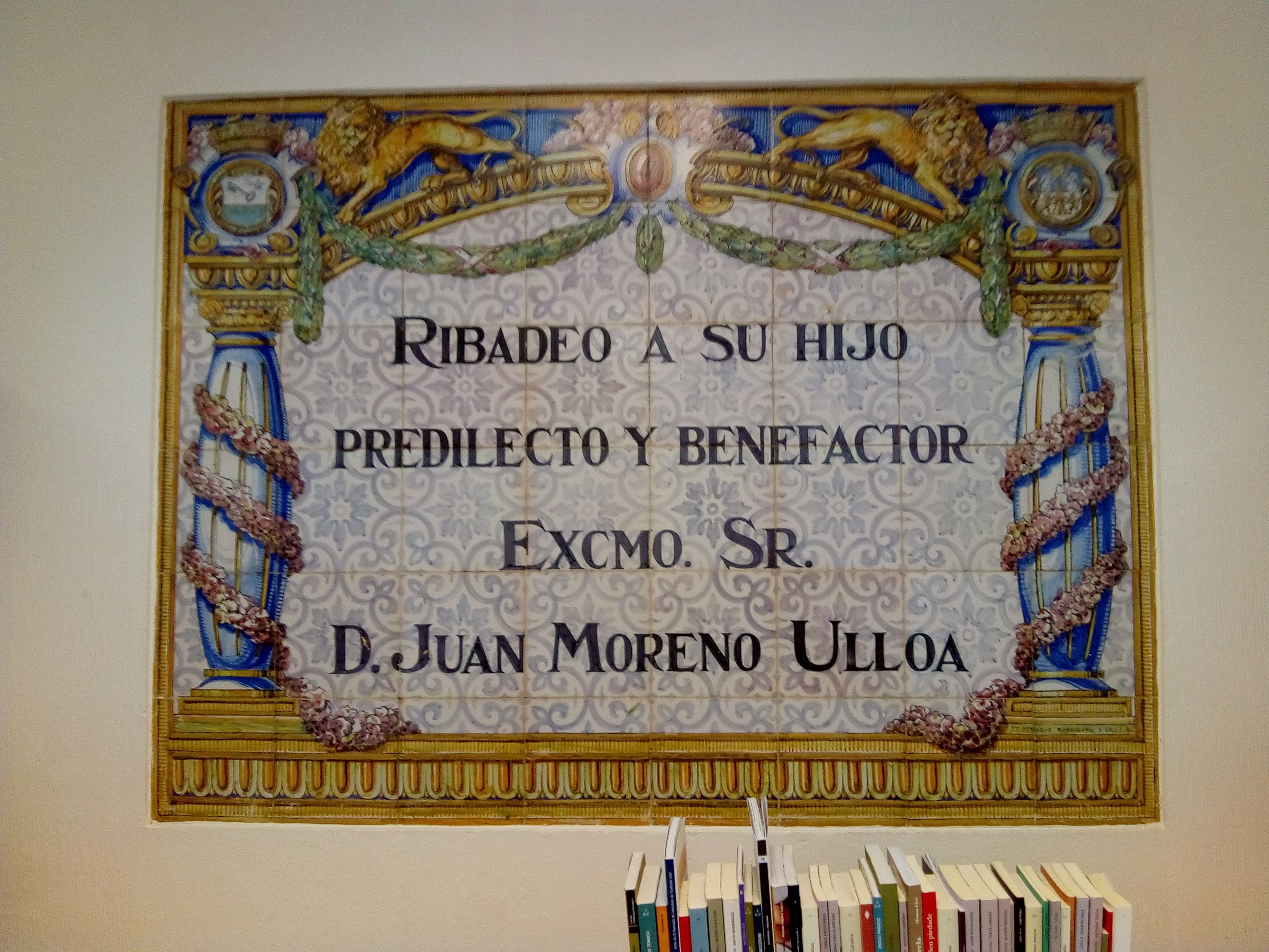 Placa de homenaxe na biblioteca pública 'el Viejo Pancho' de Ribadeo